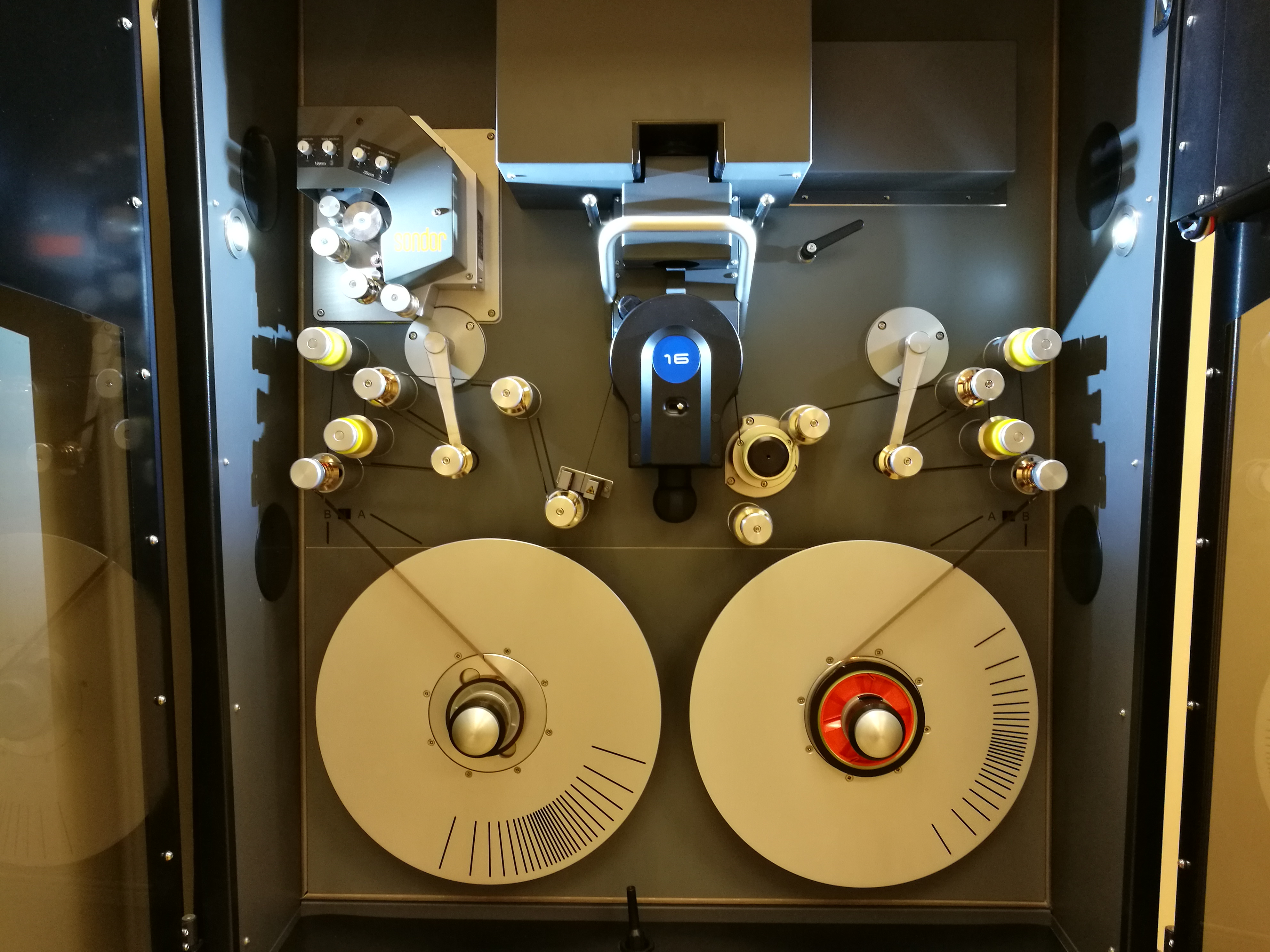 עמדת סריקת תמונה במעבדת הדיגיטציה